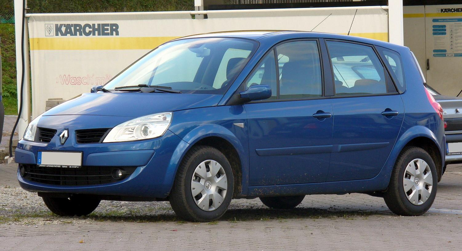 Renault Scénic facelift